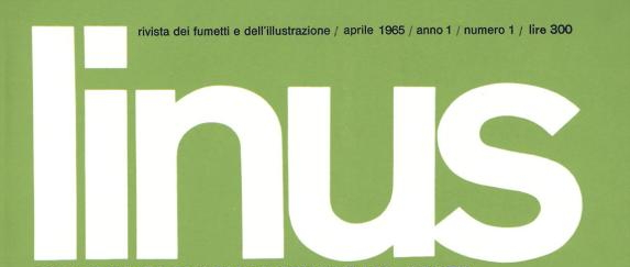 Titolo di prima numero di Linus, april 1965.